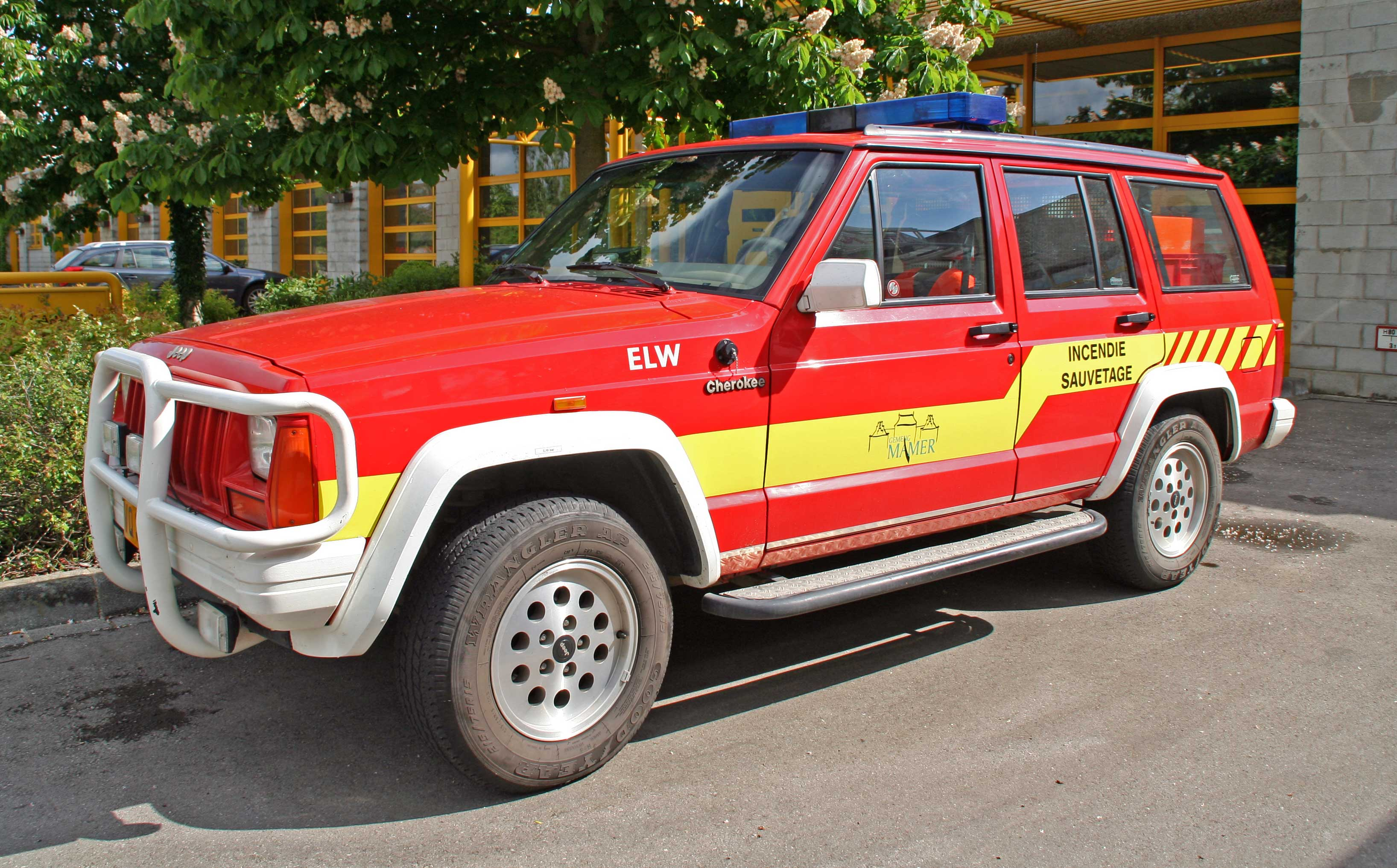 Pomp Mamer ELW.